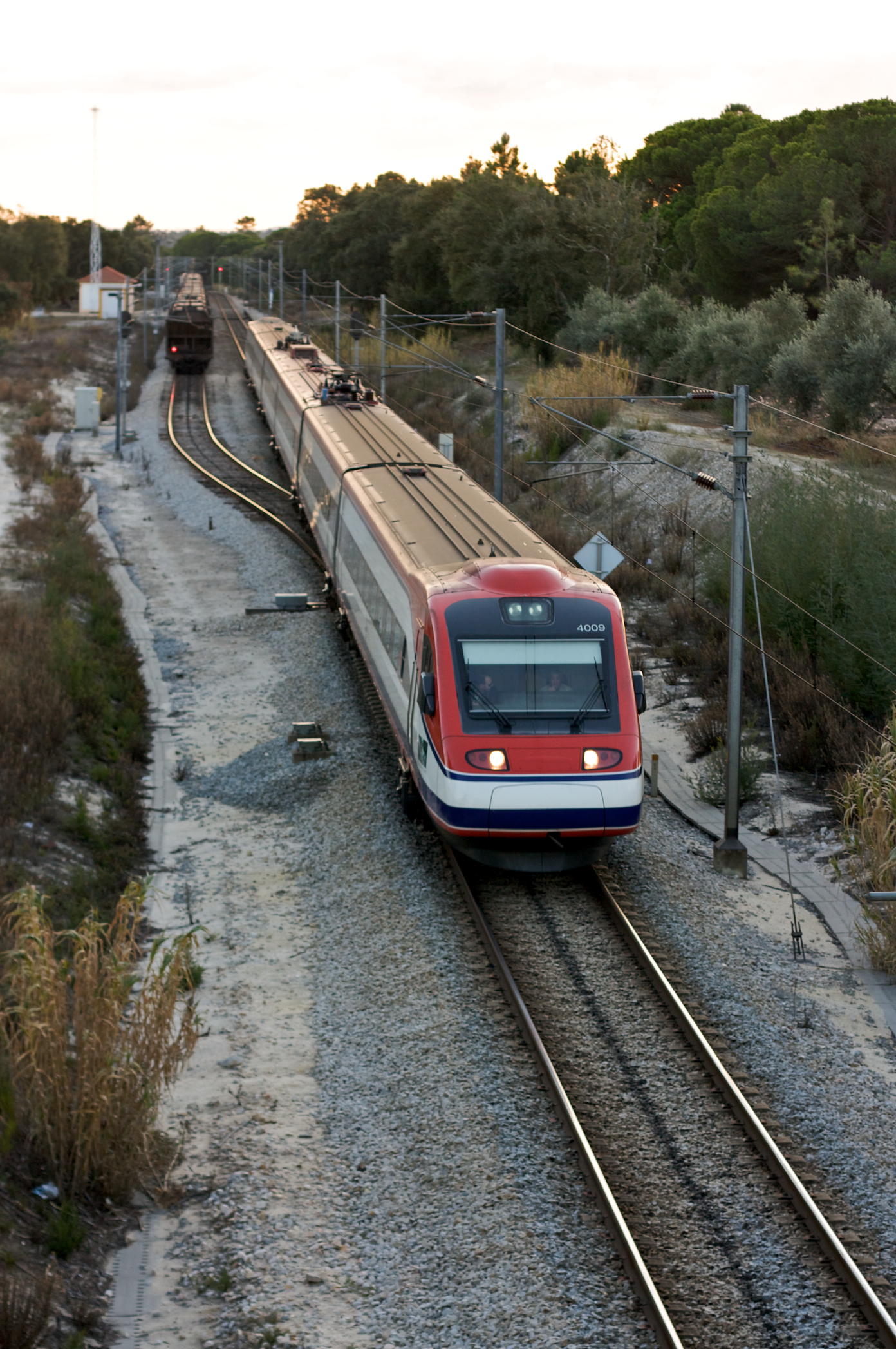 Tipo: Comboio Alfa Pendular 184 [Faro - Porto • Campanhã] Local: Estação de Vale do Guizo [Linha do Sul, PK 87] Data e hora: 17 de Dezembro de 2008 [16h53] Material: Automotora 4009 Manoel de Oliveira [Comboio de Pendulação Activa]